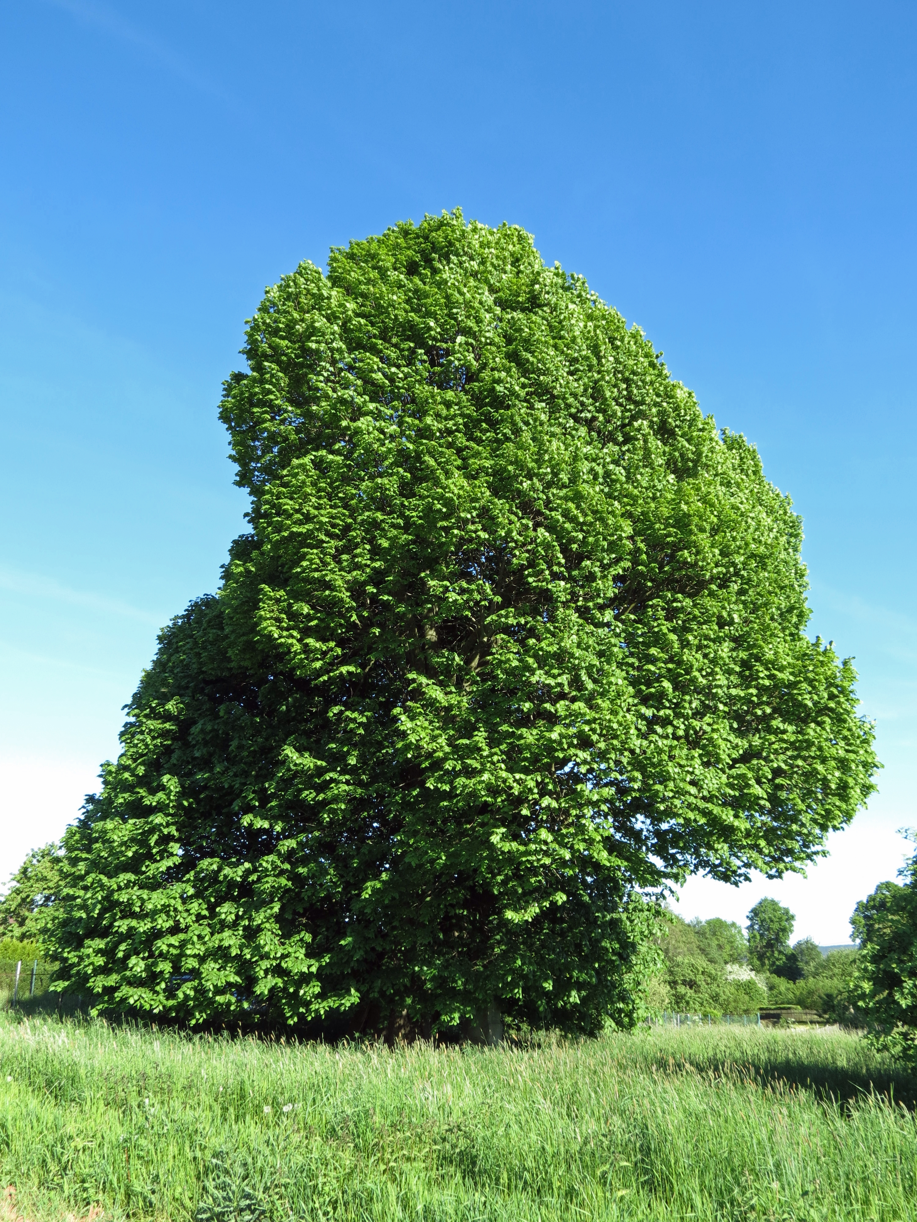 Lípa velkolistá ve Stříteži